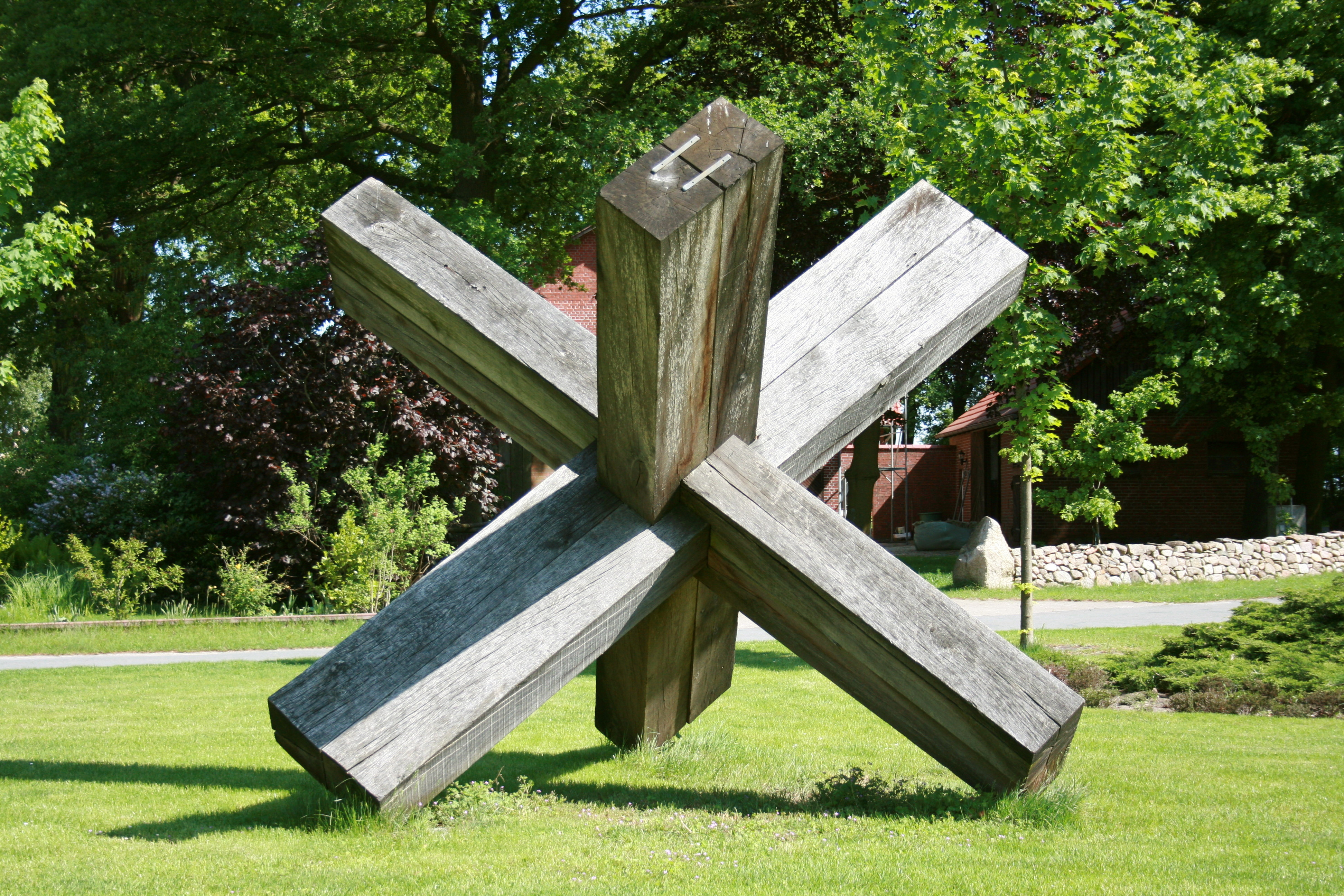 „Raumknoten“, Skulptur von Rudolf Wachter im Projekt Kunst-Landschaft des Kunstvereins Springhornhof in Neuenkirchen (Lüneburger Heide)